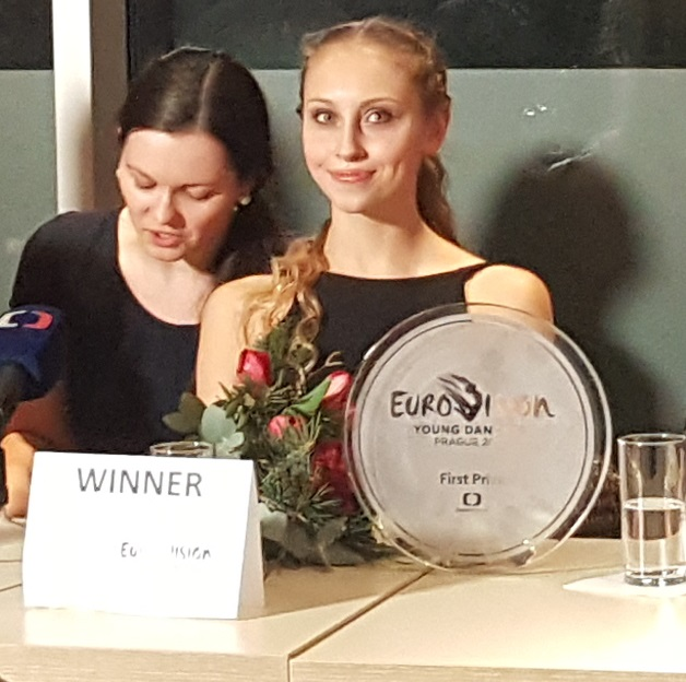 Polska tancerka Paulina Bidzińska na konferencji prasowej dla zwycięzcy Konkursu Eurowizji dla Młodych Tancerzy 2017.